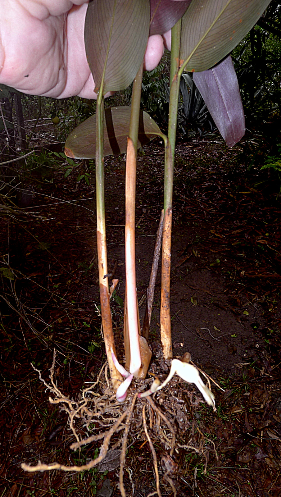 Maranta subterranea J.M.A.Braga